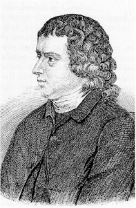 Robert Robinson (1735-1790)